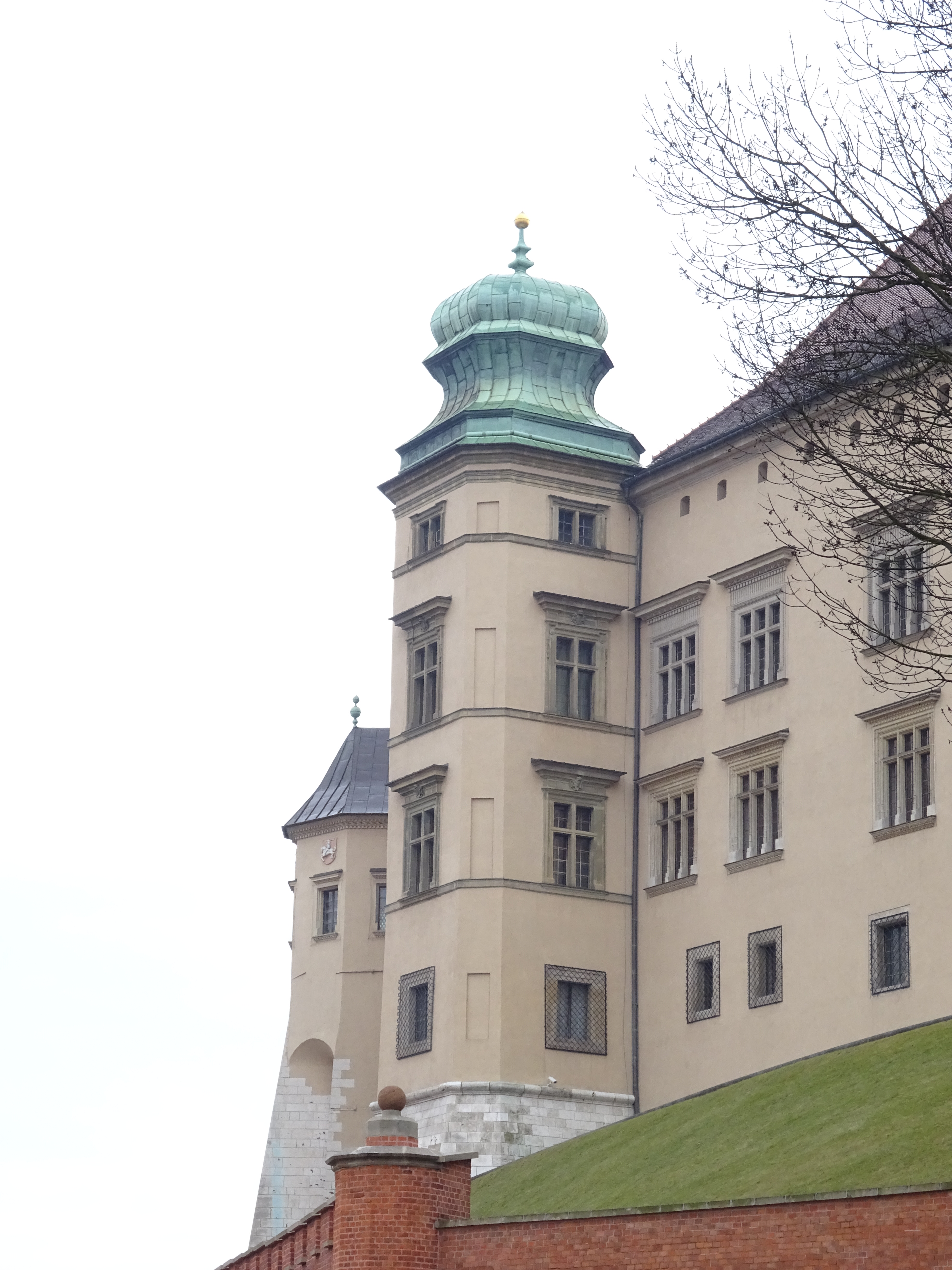 Wieża Zygmunta III Wazy na Wawelu, widok z ul. Podzamcze.